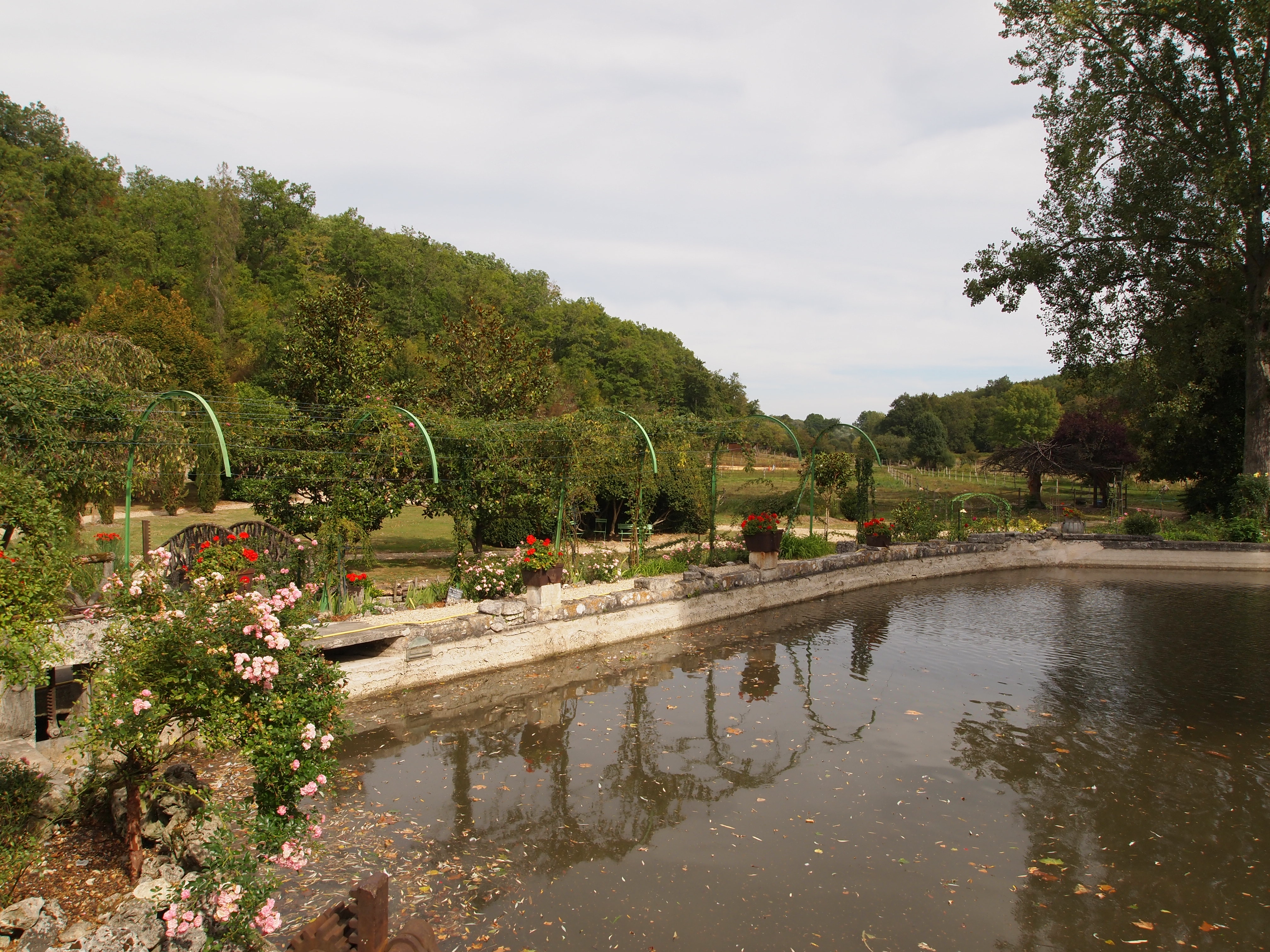 Moulin de Nanteuillet, à Voulgézac en Charente (France) (inscrit, 2010)